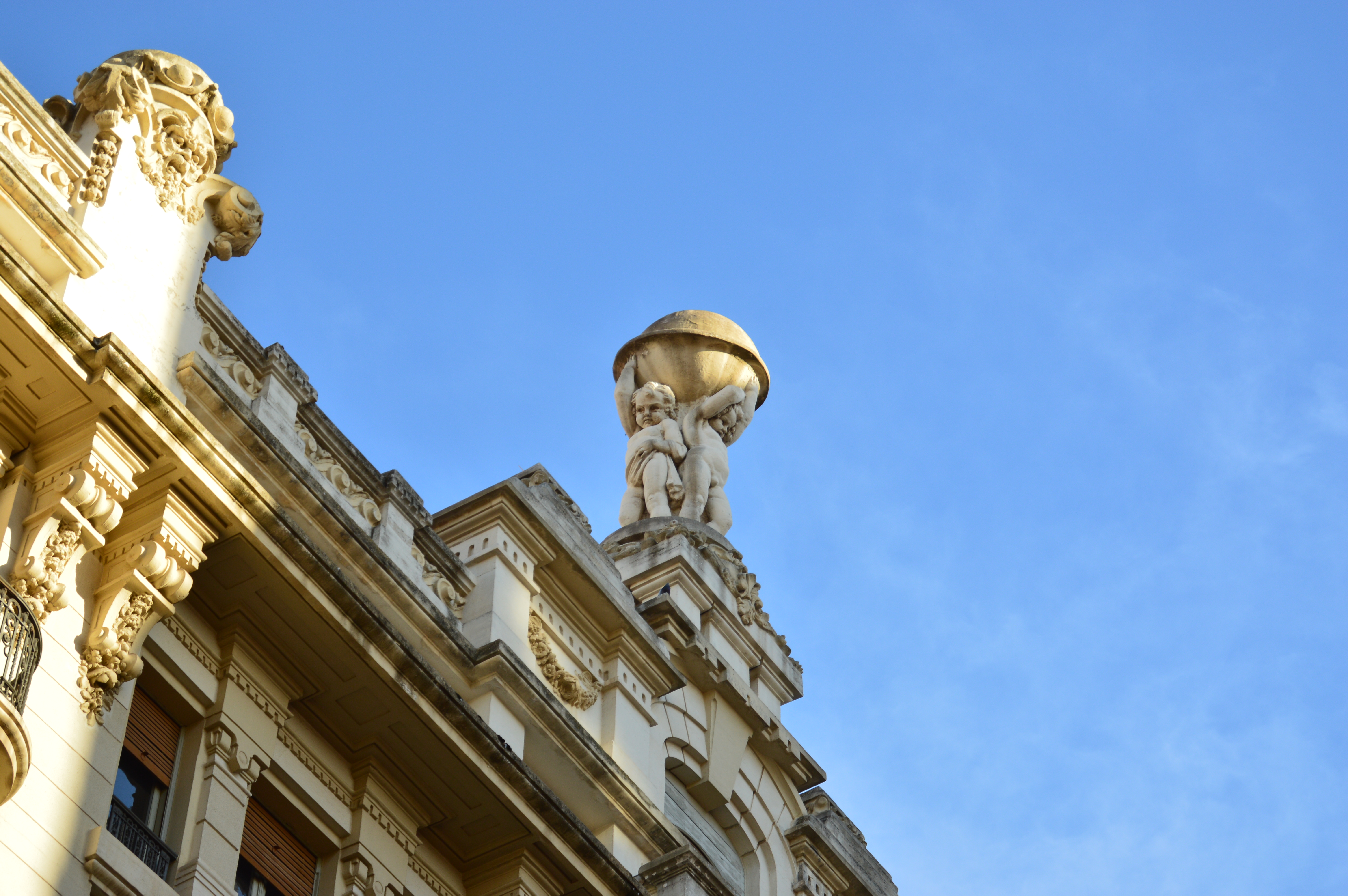 Escultura Niños de la Bola. Casa Cabot. Edificio de viviendas para Filiberto Cano. Arq. Julio Carrilero Prat y Manuel Muñoz II. Calle Ancha. Centro. Albacete